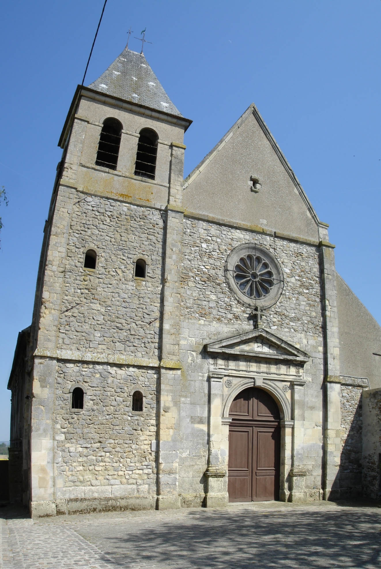 Façade de l'église de Mareil-en-France (Val-d'Oise), France